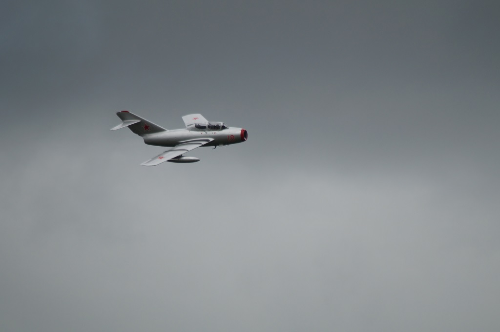 MiG-15 UTI na patrolu